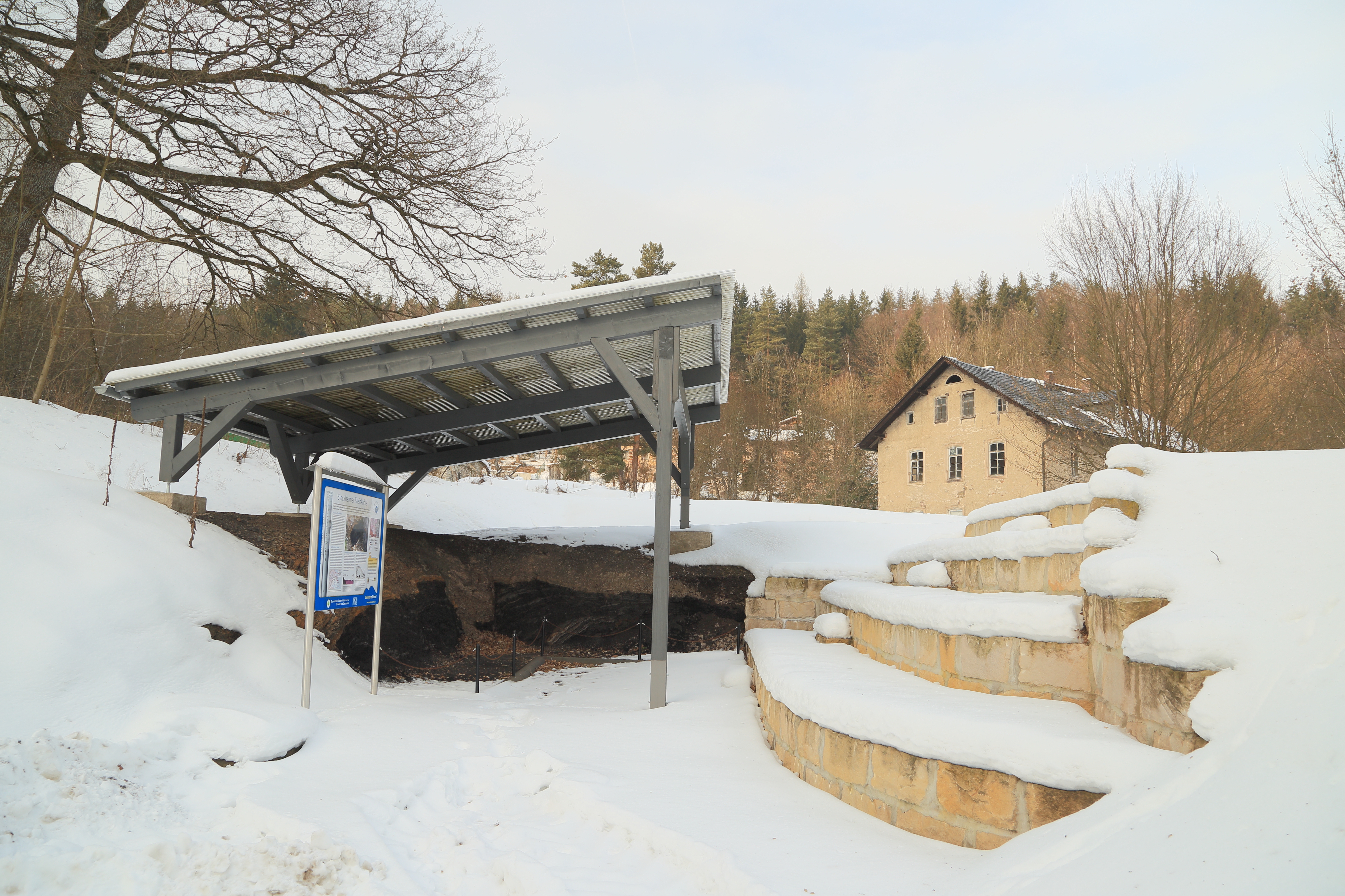 Stockheimer Steinkohleflöz Schönstes Geotop Nummer 67 Geotop-Nummer: 476G003